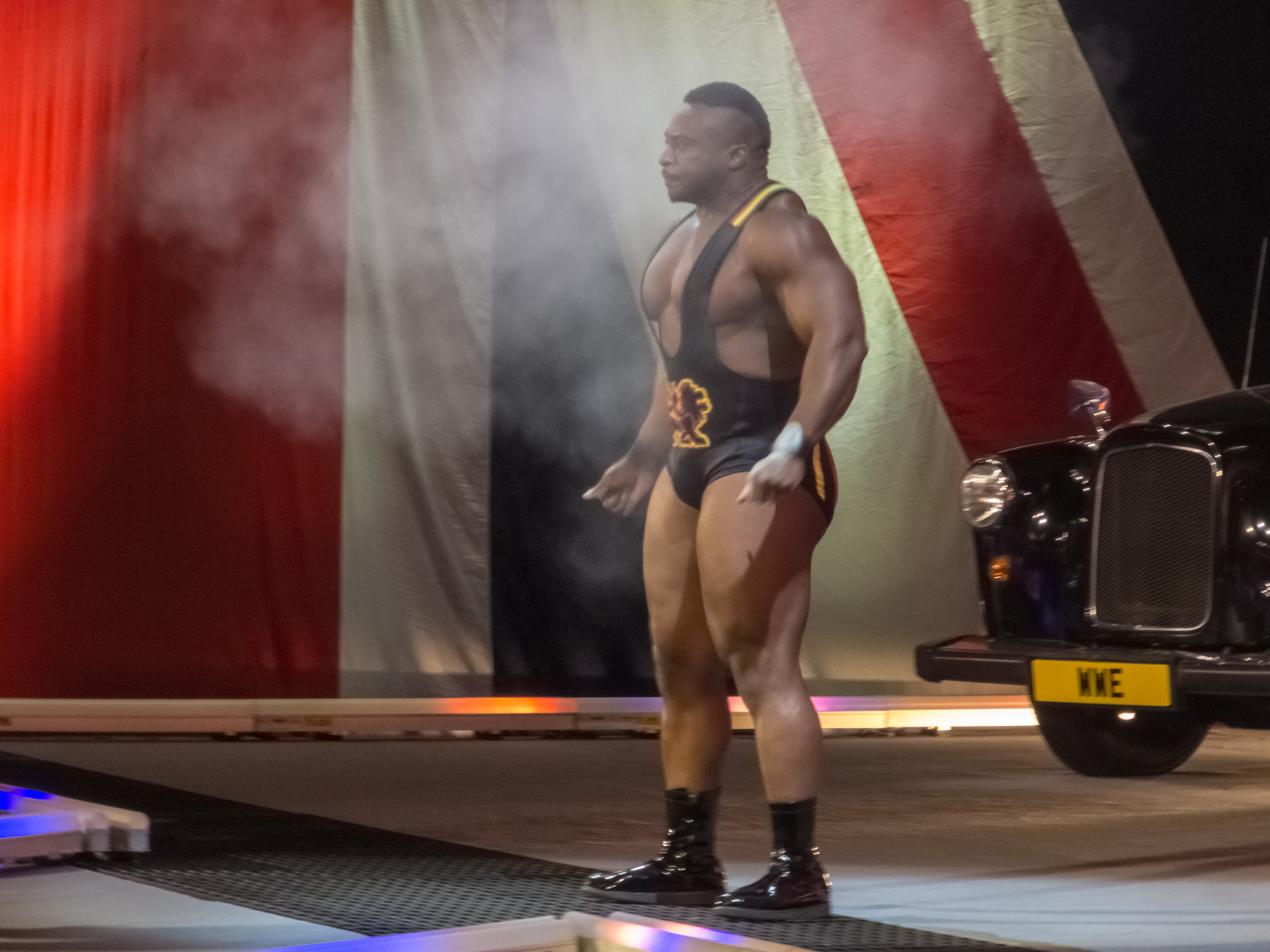 Big E Langston @ RAW